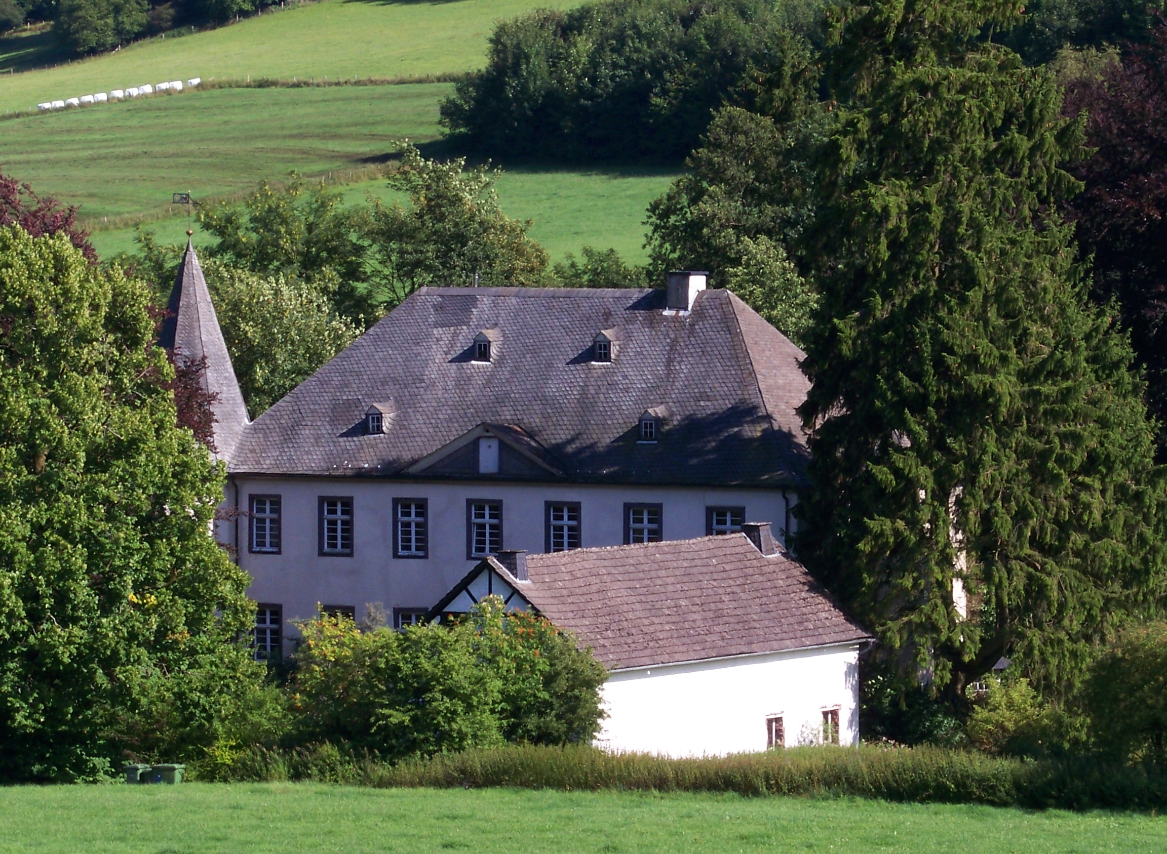 Schloss Obersalwey, Eslohe (Germany)